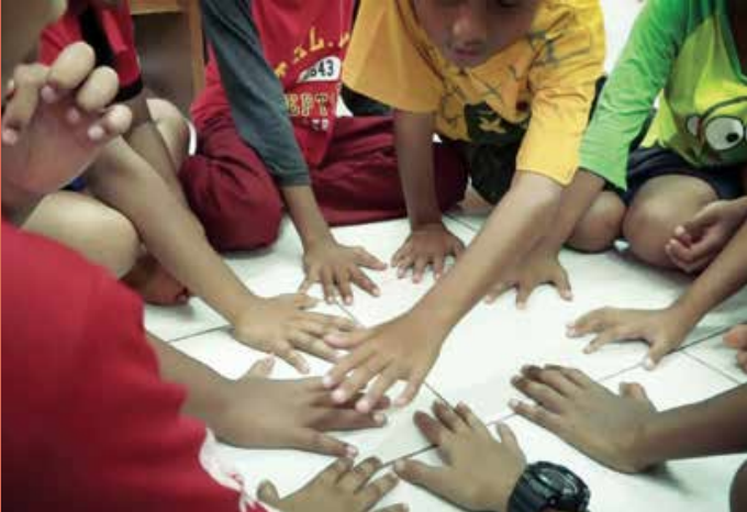 Foto Permainan Tradisional Cici Putri